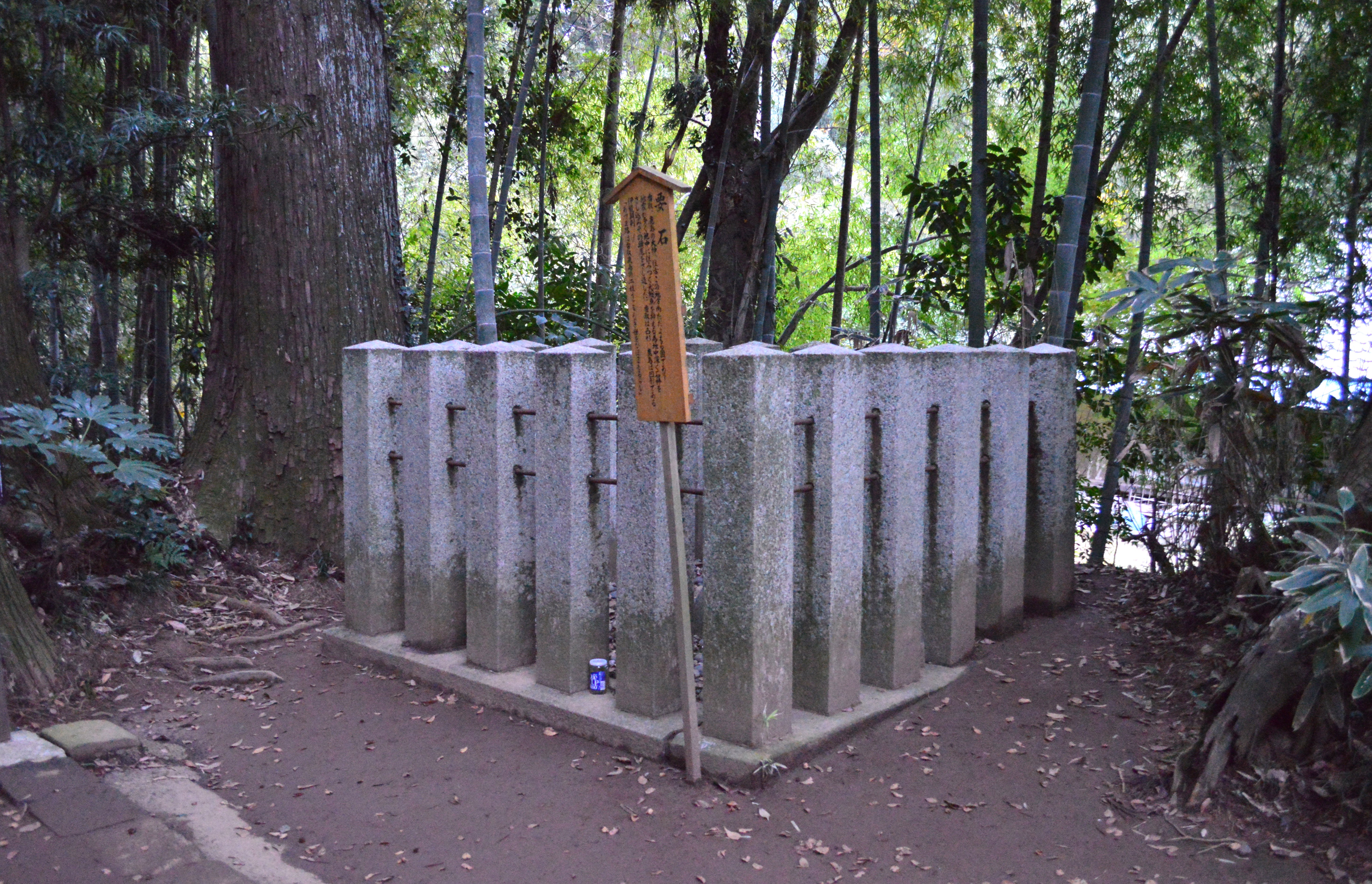 香取神宮 要石 (外観)